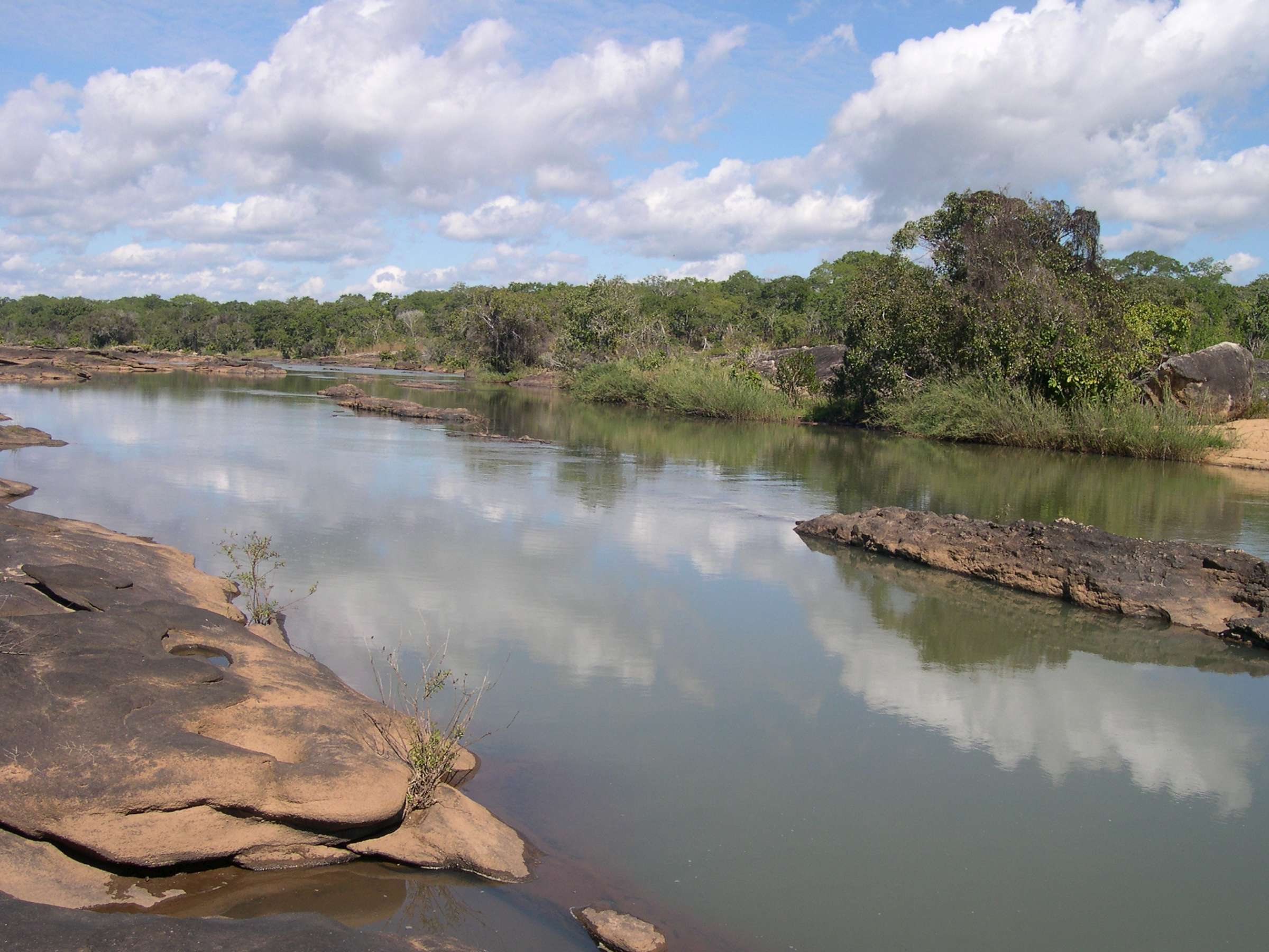 Distretti di Gilè e Pebane. Riserva di Gilé